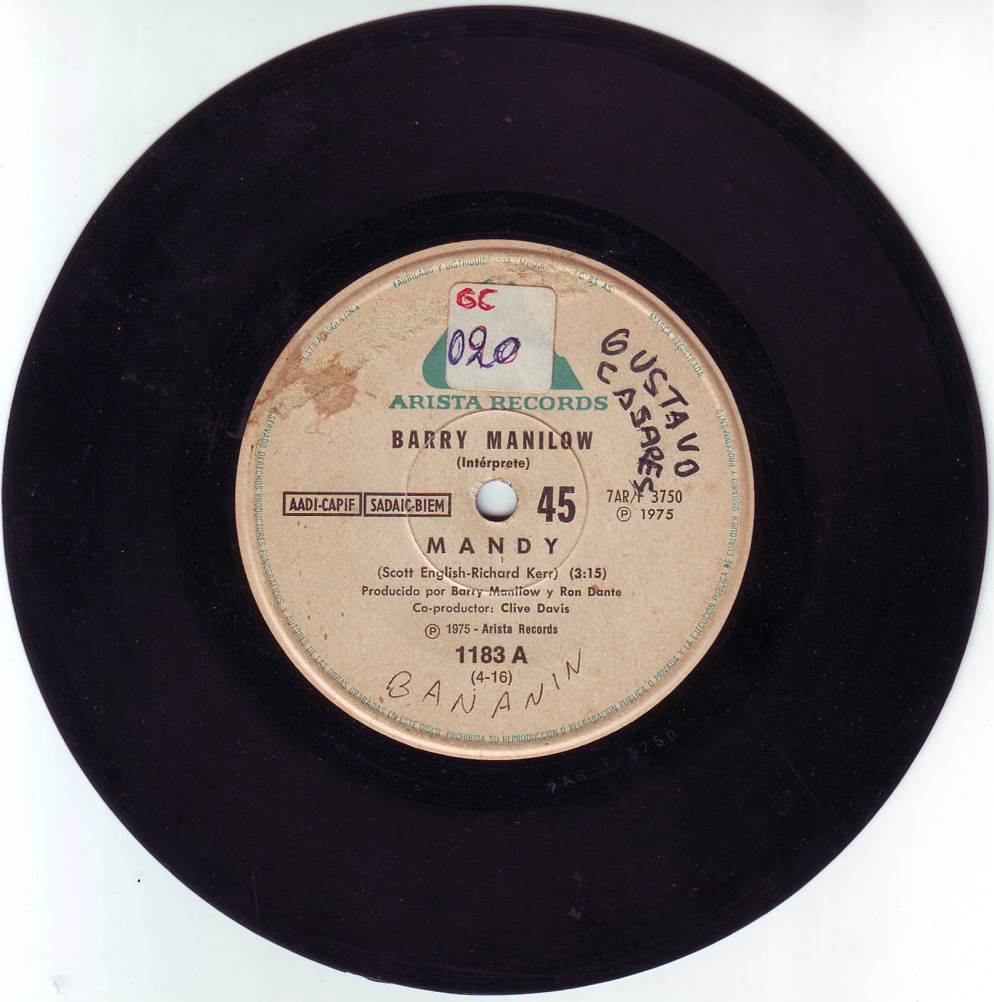 Disco de vinilo simple de "Mandy", interpretado por Barry Manilow